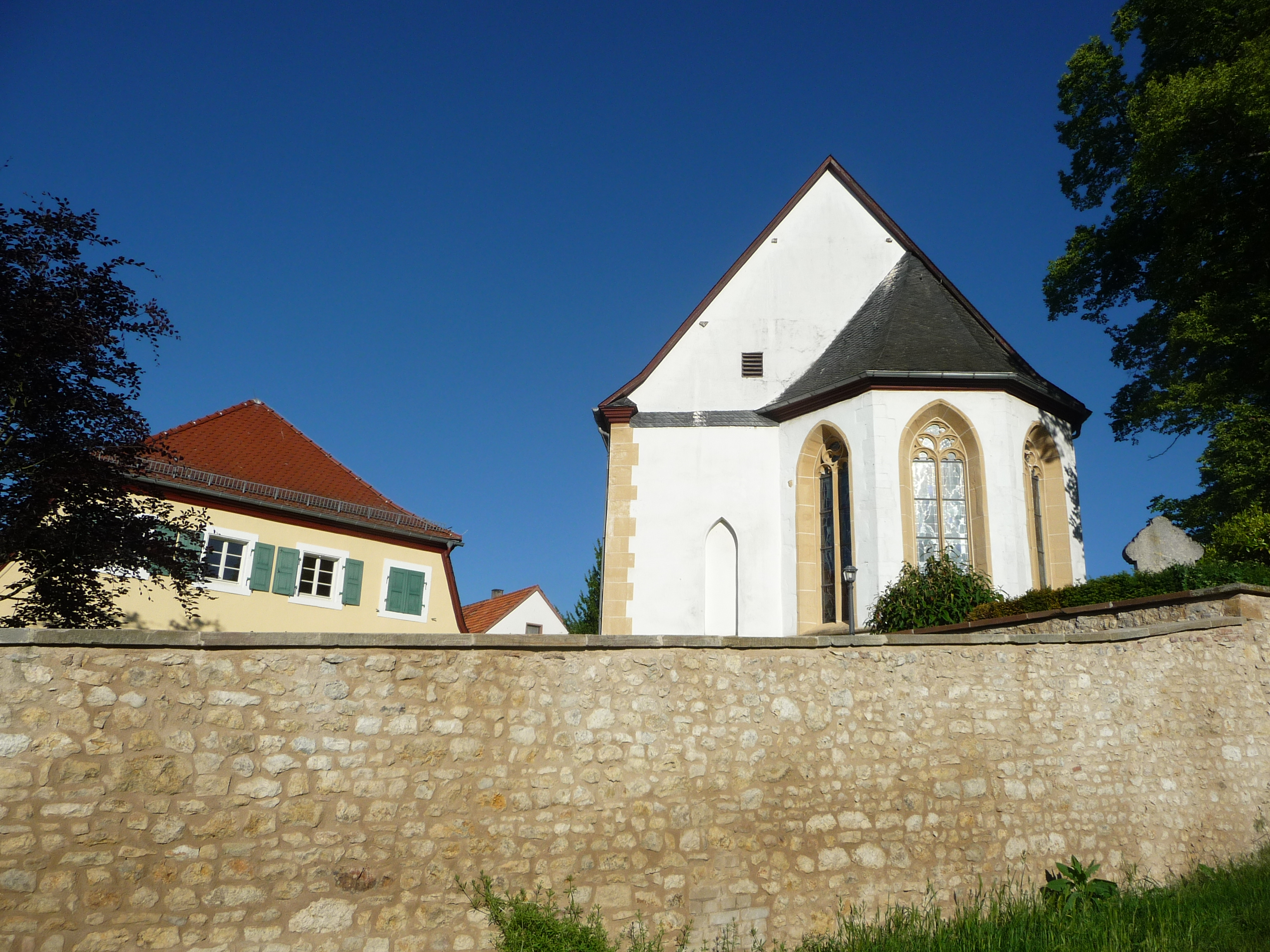 Hangen-Weisheim ist eine Ortsgemeinde im Landkreis Alzey-Worms in Rheinland-Pfalz.